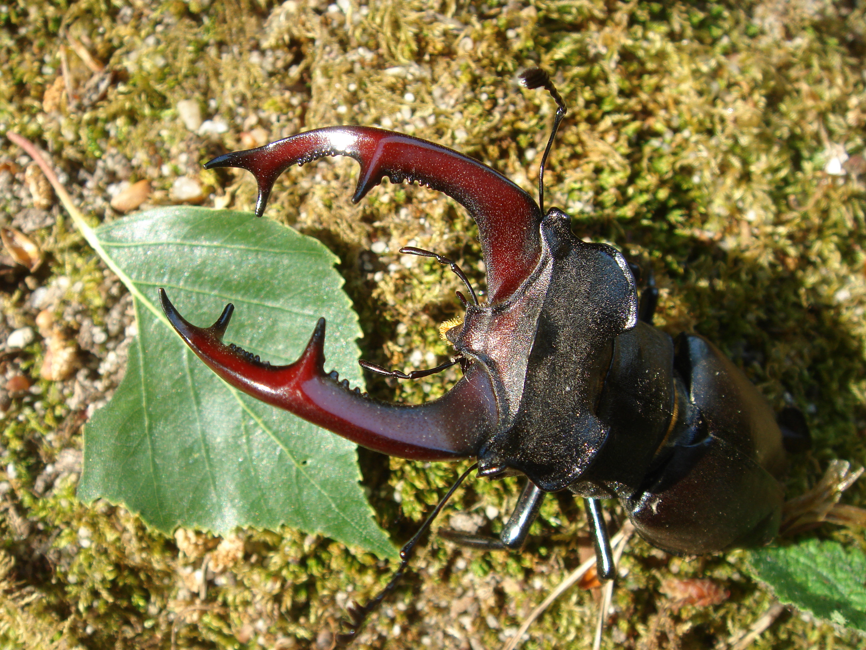 Lucanus cervus, Hirschkäfer (Kelsterbach, Germany)